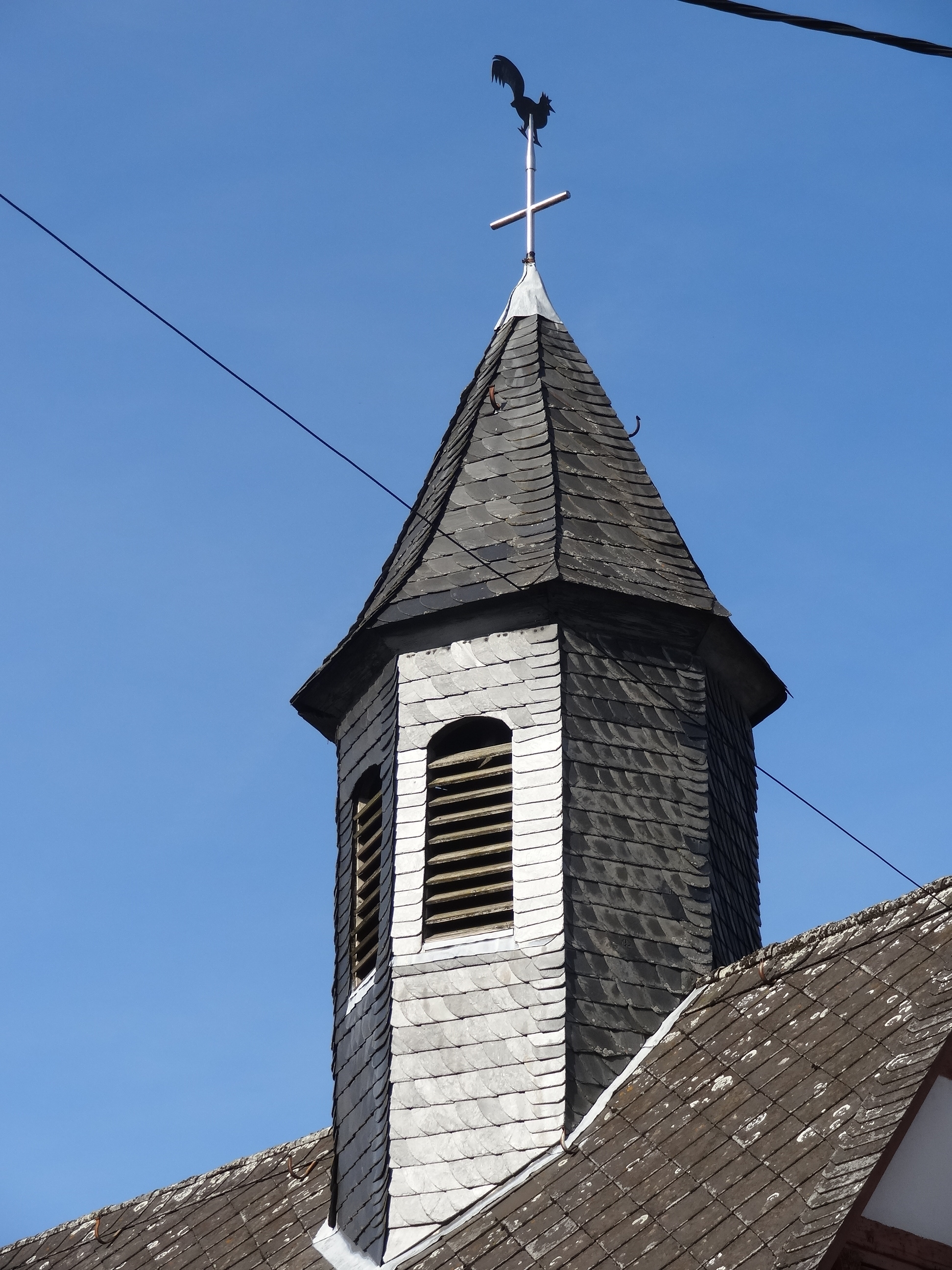 Evangelische Kirche Klein-Eichen